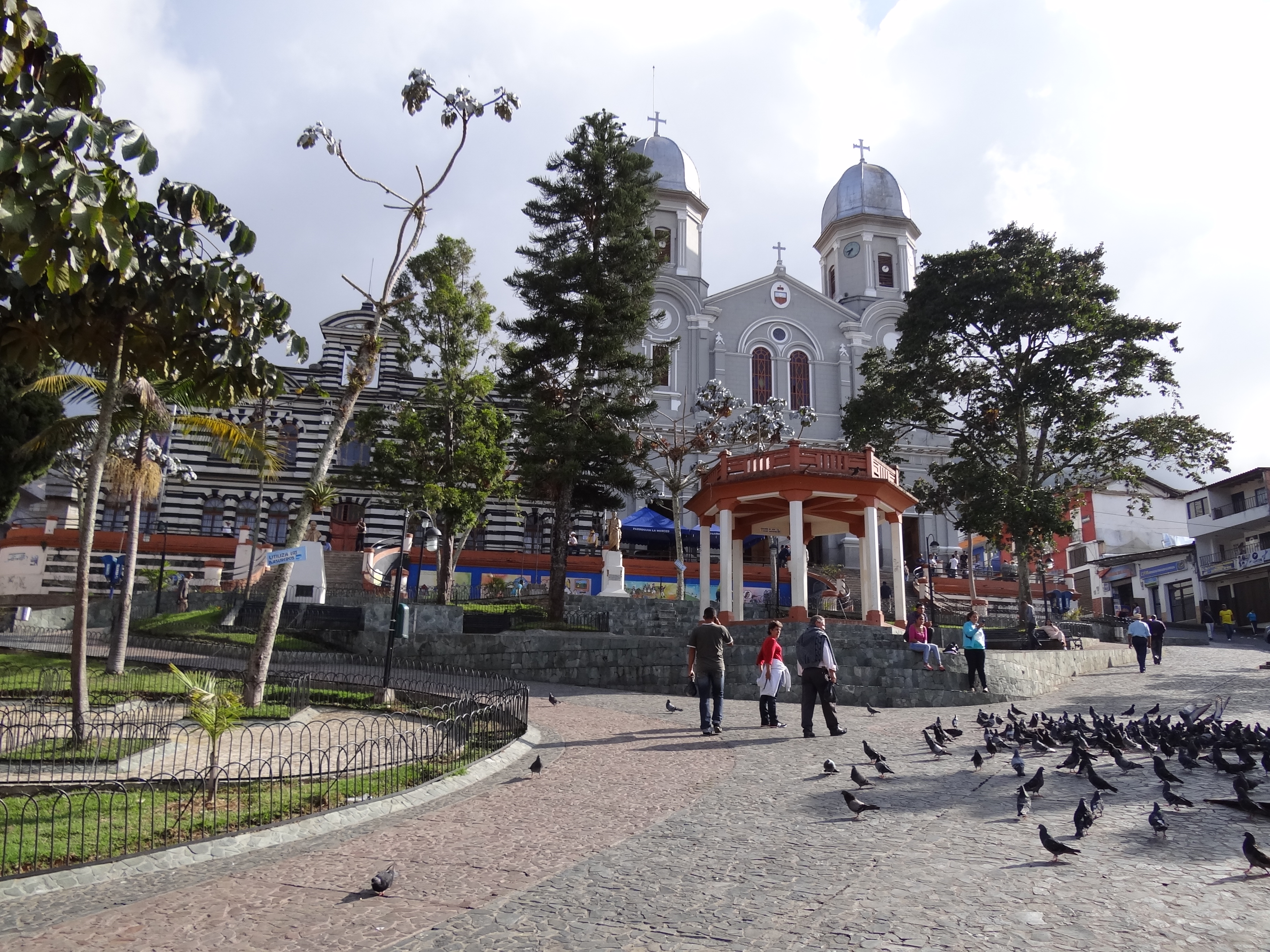 Parque principal, municipio de Yarumal, departamento de Antioquia, Colombia